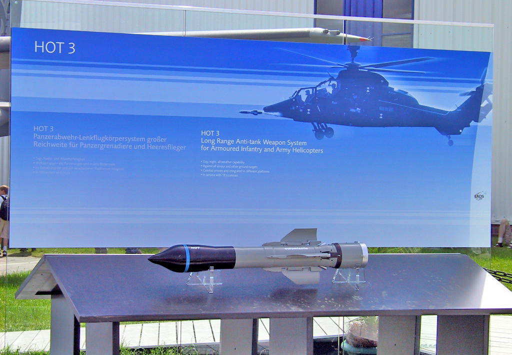 Panzerabwehr-Lenkflugkörper HOT 3 auf der ILA 2002.